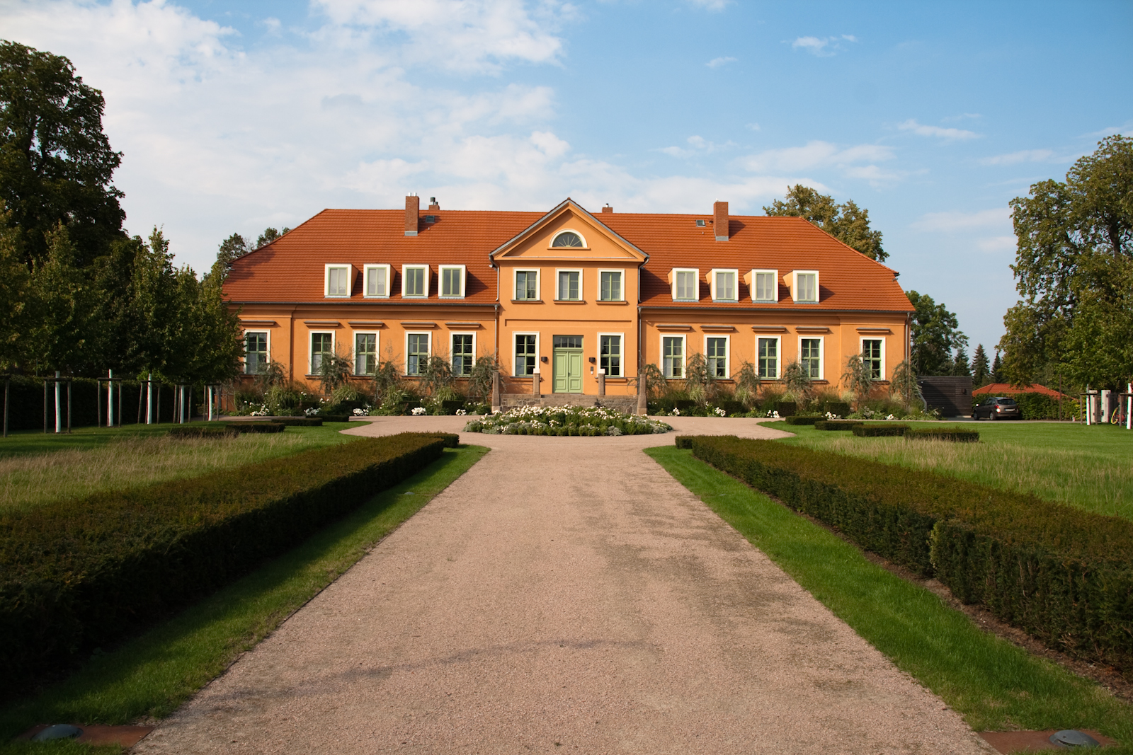 Saniertes Gutshaus im Zentrum von Rogeez. Fotografiert aus der Sicht des Haupteingangs.